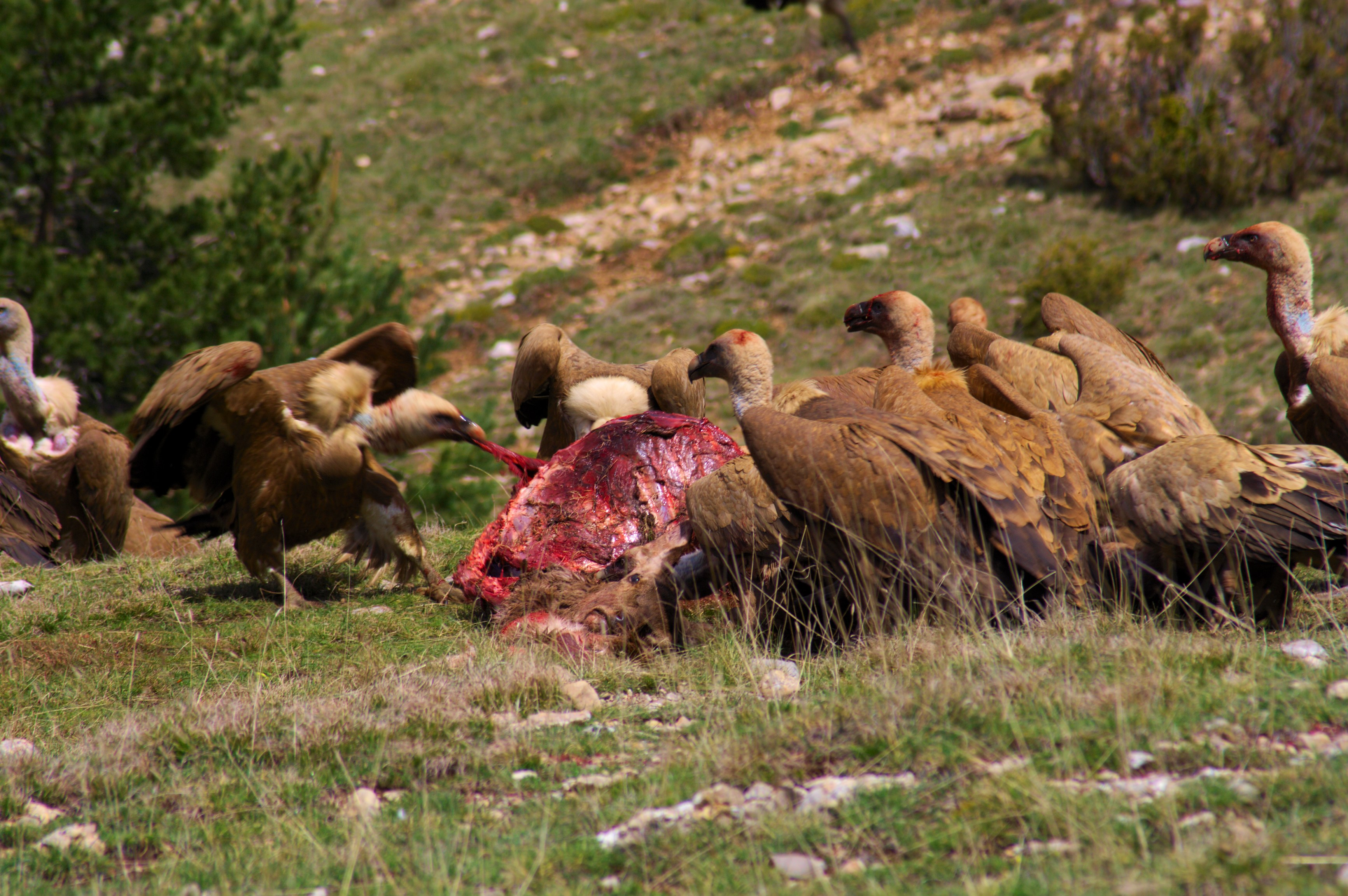 Un grupo de buitres leonados Gyps fulvus desciende del cielo y aterriza sobre una cierva muerta, en el prepirineo de Lérida (Cataluña).